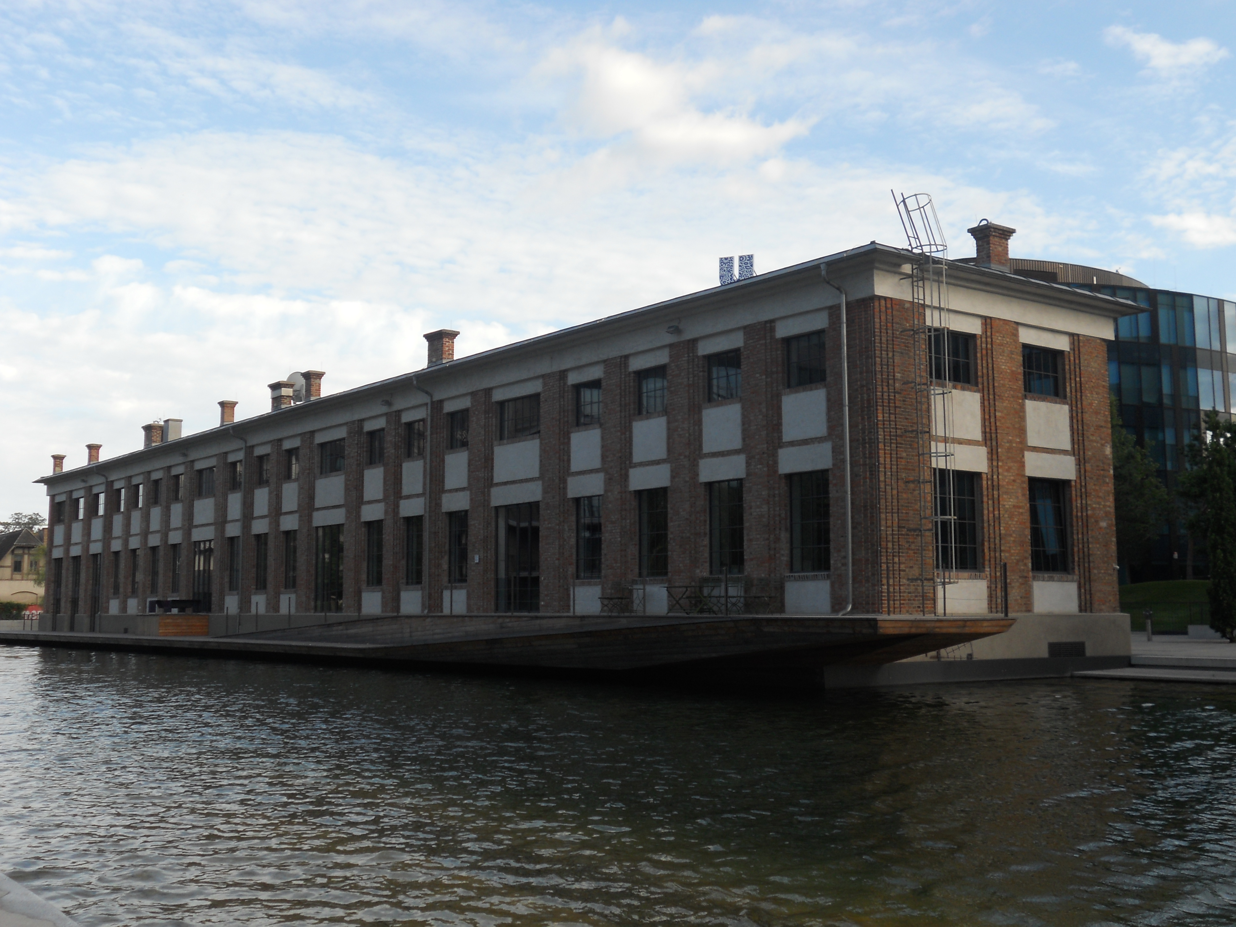 Bürogebäude Stella-Klein-löw-Weg 8